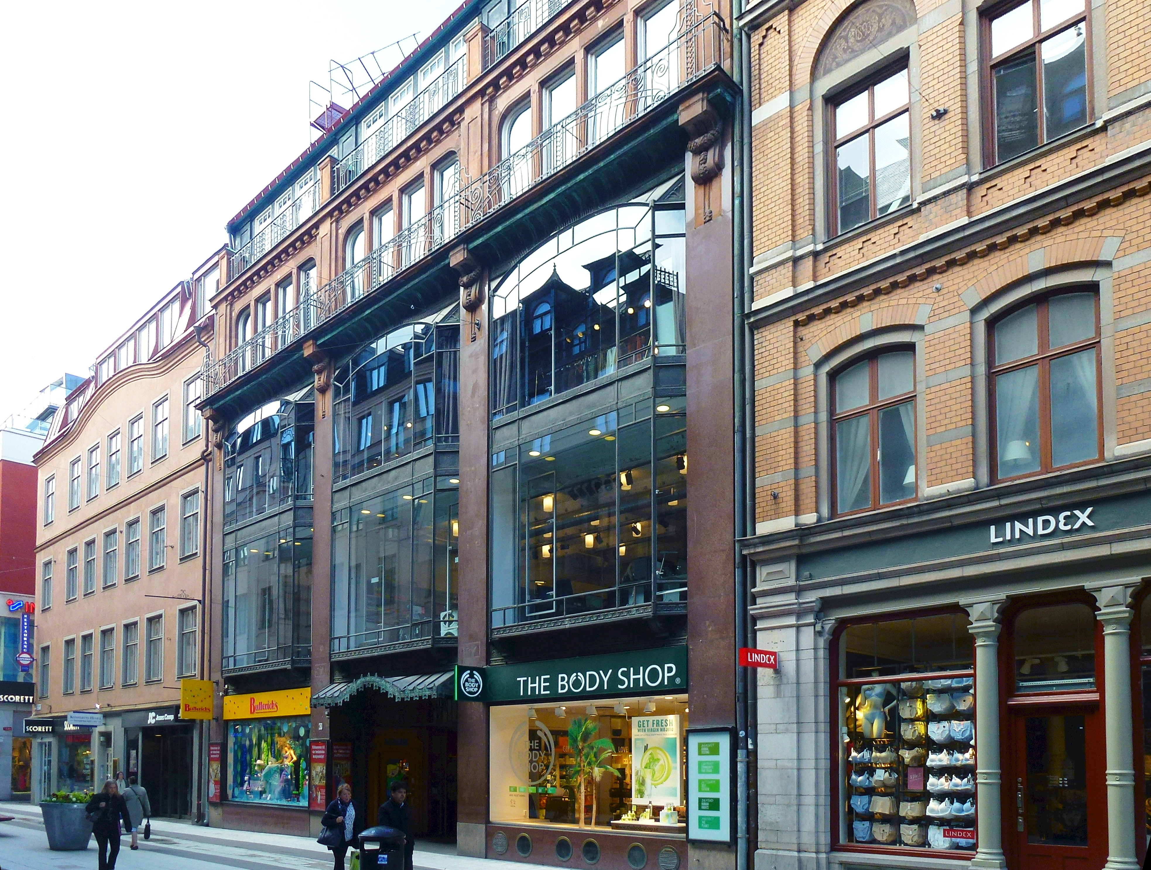 Butterickshuset Drottninggatan